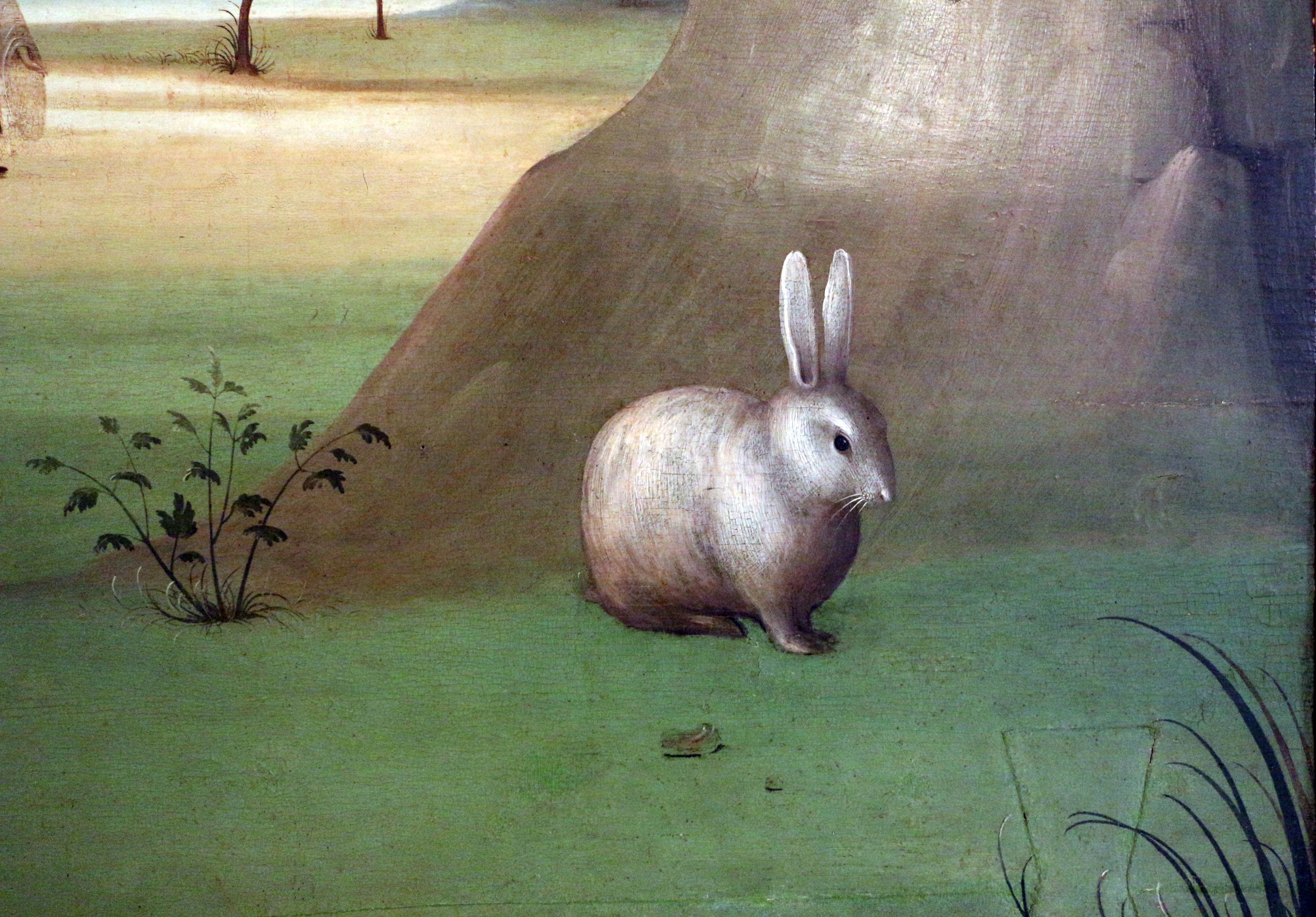 Palazzo dei Diamanti (Ferrara) This is a photo of a monument which is part of cultural heritage of Italy.